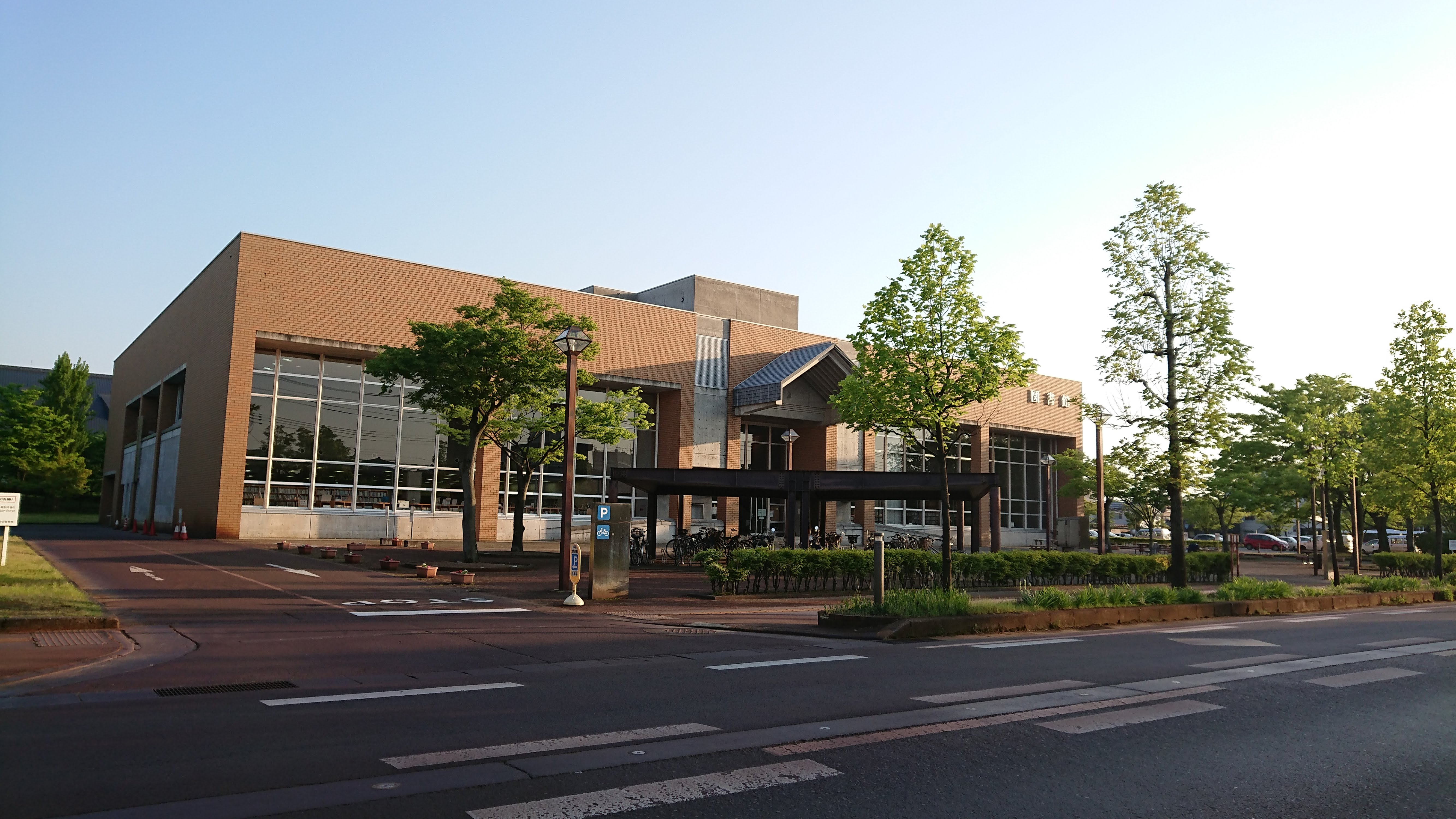 長岡市立中央図書館の外観